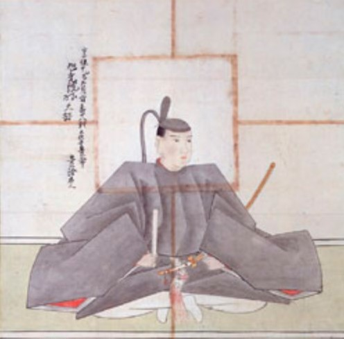 山内豊常の肖像。